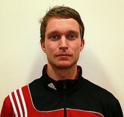 Koskenkorvan Urheilijoiden kauden 2014 pelaajakuva. Pelaaja: Juha Katajisto